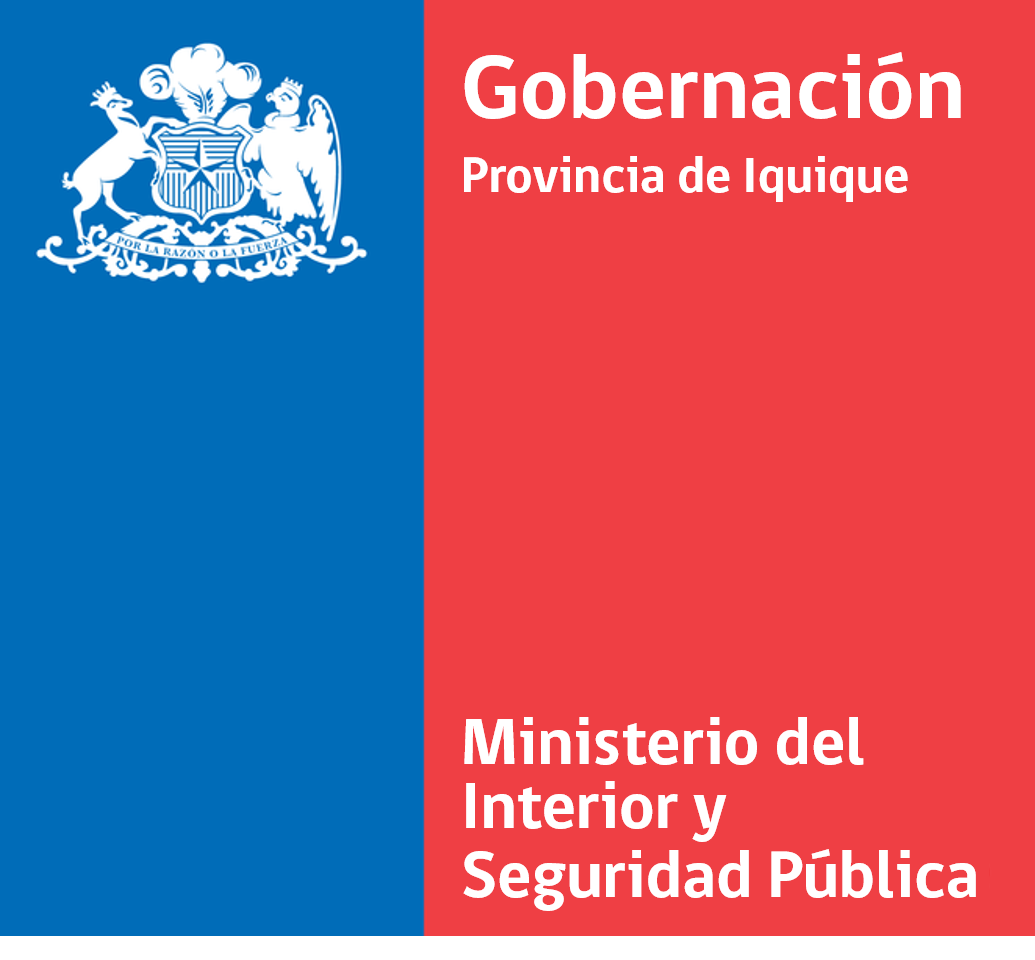 Logotipo de la gobernación provincial, usado desde 2010, durante la administración de Sebastián Piñera.